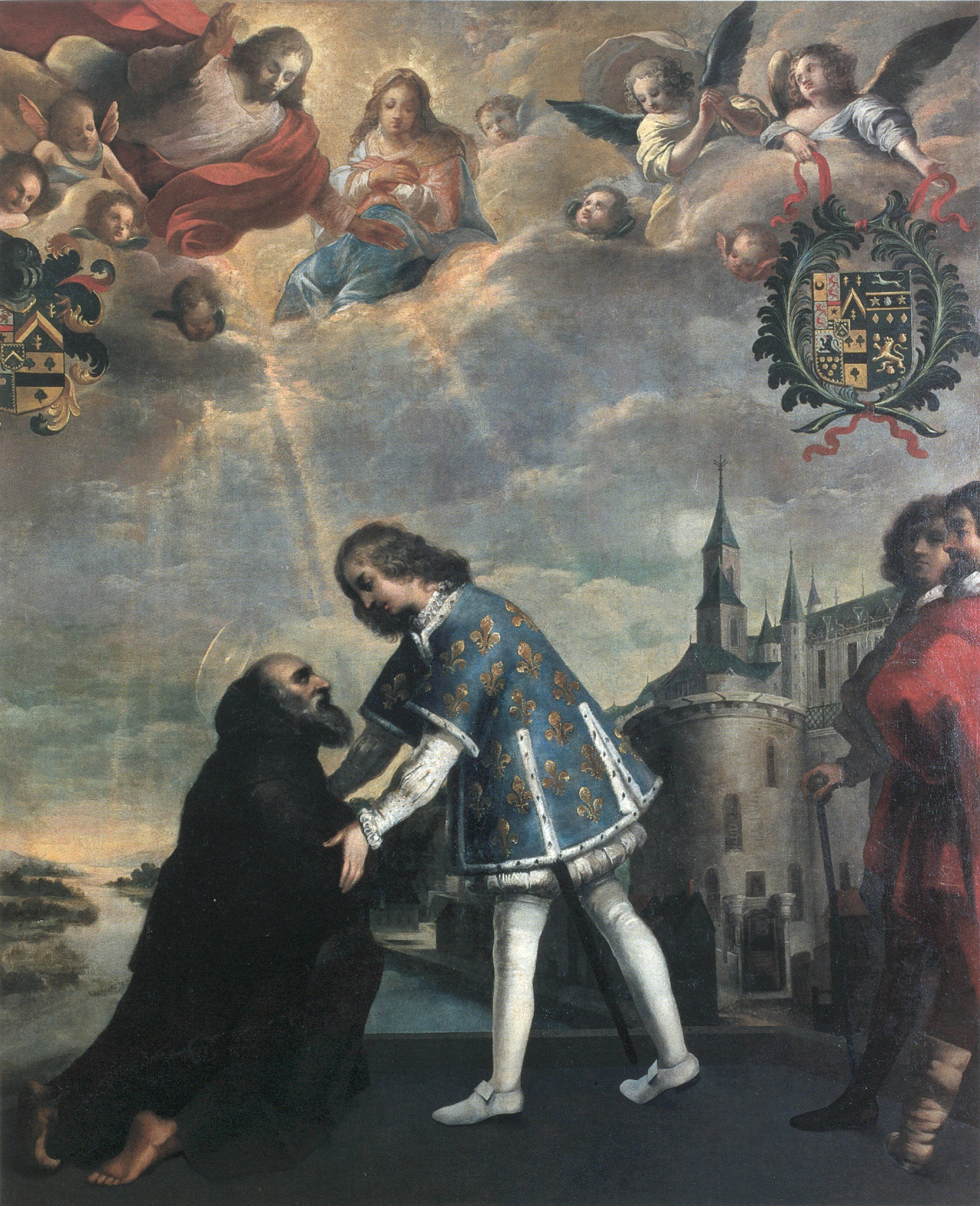 Der französische Dauphin Karl (später König Karl VIII.) empfängt 1483 Franz von Paola in Amboise